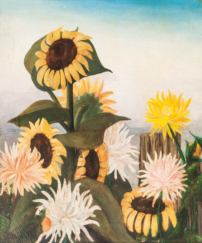 Spätsommer